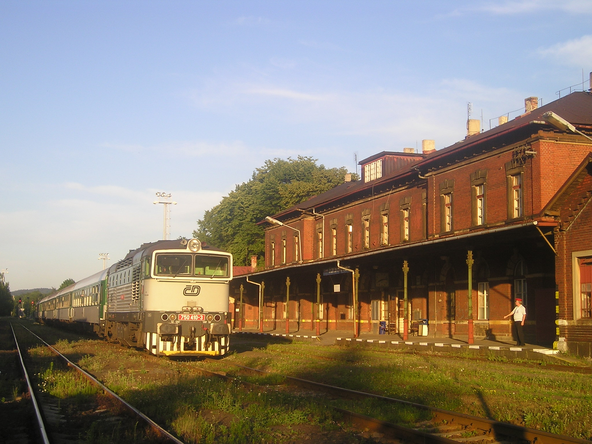 Nádraží Liberec-Horní Růžodol